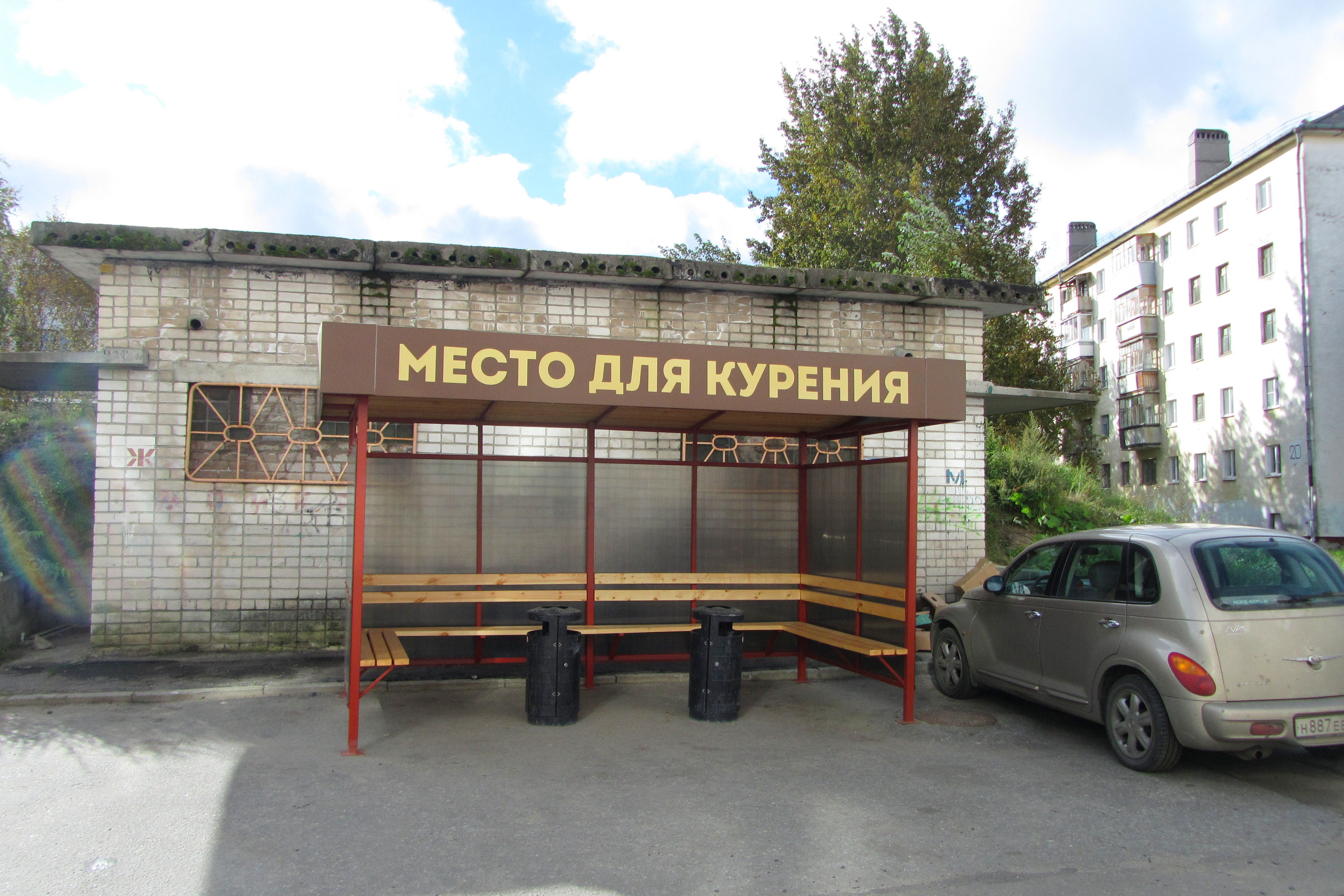 Курилка за Никольским Посадом. справа дом № 20.